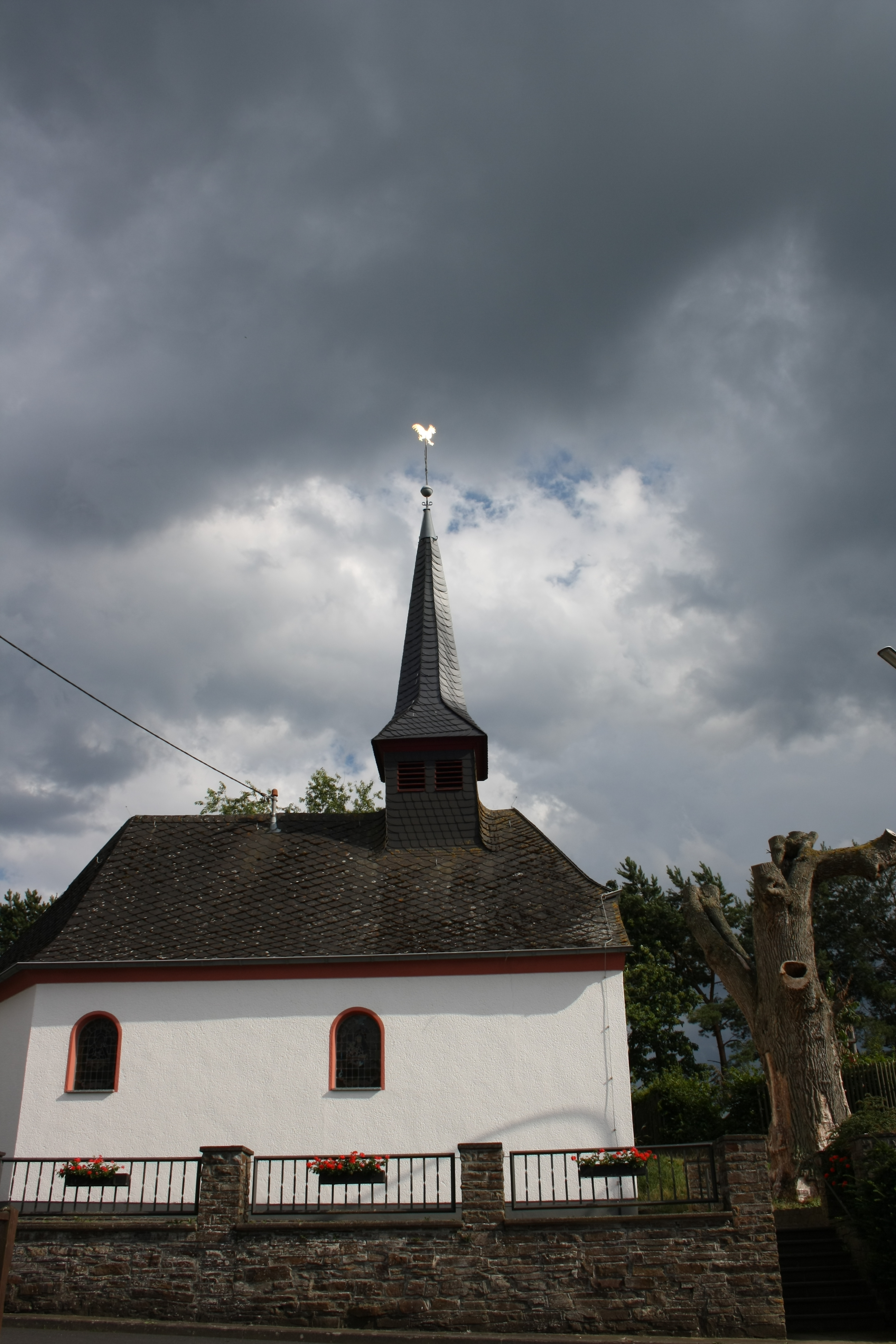 Katholische Kapelle St. Apollinaris in Winnerath